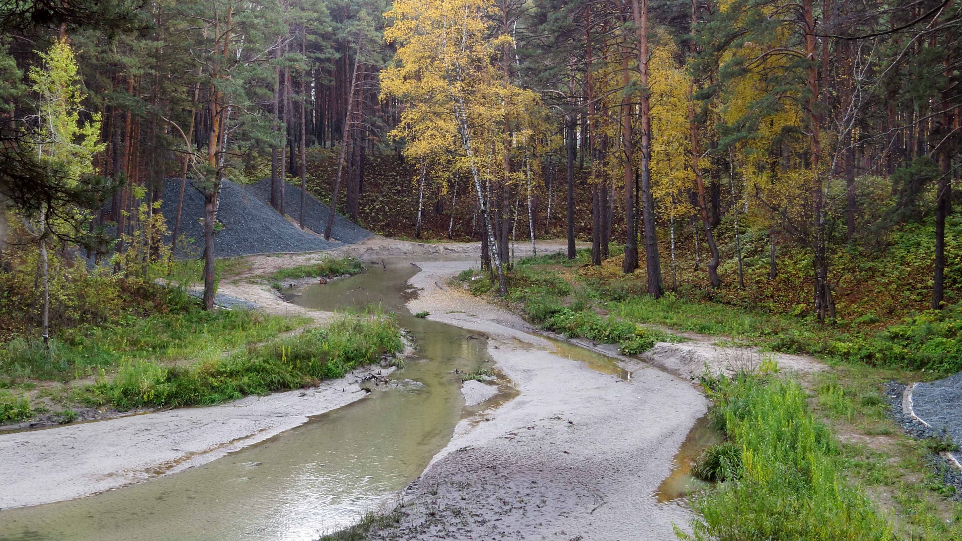 Гилевская роща: Тюмень, Тюменская область This image is related to the protected area of Russia number 7230137